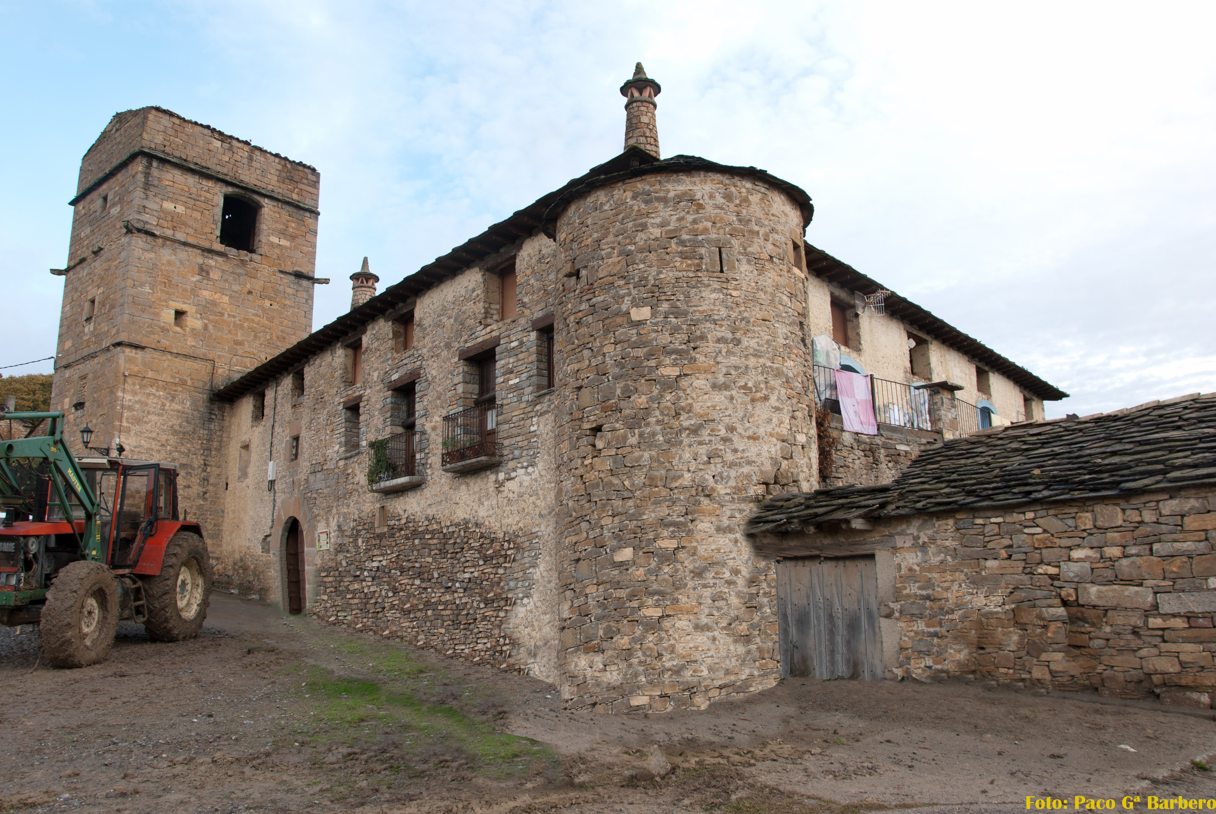 Casa fortificada con torres de planta cuadrada y planta circular